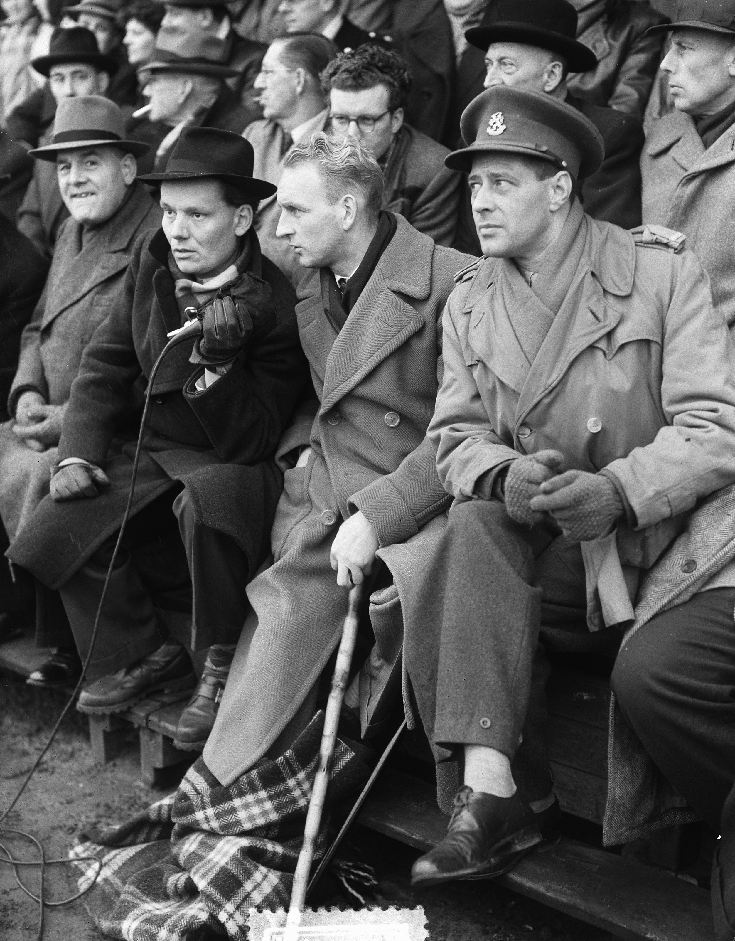 Collectie / Archief : Fotocollectie Anefo Reportage / Serie : [ onbekend ] Beschrijving : EDO tegen AGOVV (0-1). Schijvenaar naast radioverslaggever Leo Pagano Datum : 11 februari 1952 Locatie : Haarlem Trefwoorden : omroepers, voetbal, voetballers Persoonsnaam : Pagano, Leo, Schijvenaar, Henk Fotograaf : Pot, Harry / Anefo Auteursrechthebbende : Nationaal Archief Materiaalsoort : Glasnegatief Nummer archiefinventaris : bekijk toegang 2.24.01.09 Bestanddeelnummer : 934-5375